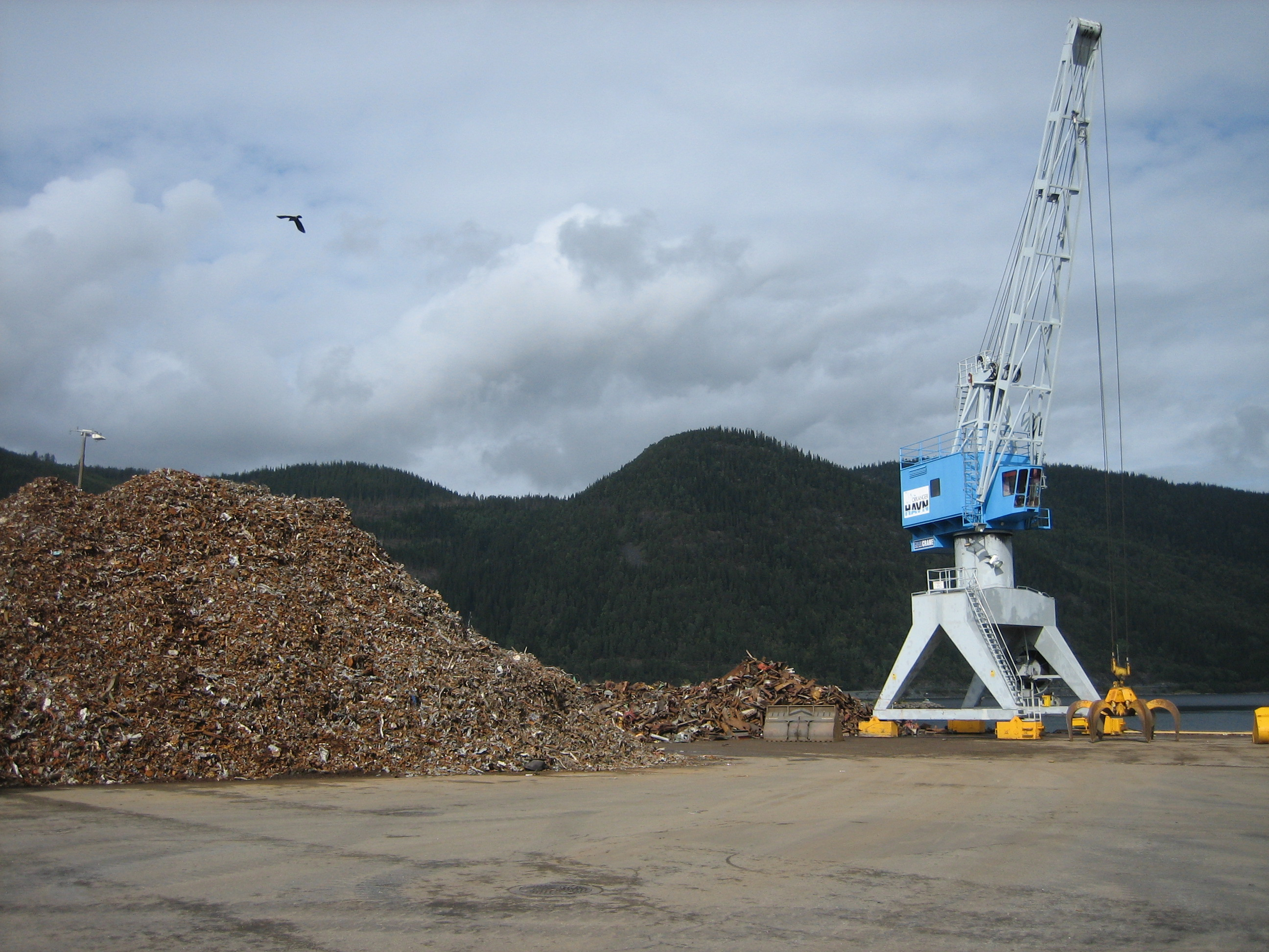 Veolia Miljø Metall